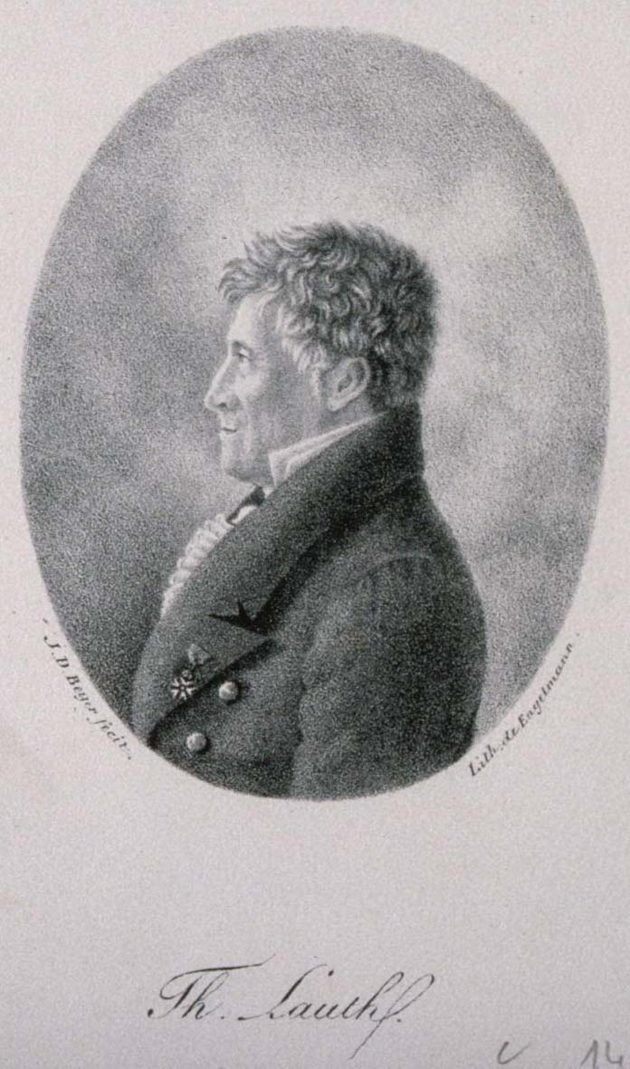 Thomas Lauth, né le 27 août 1758 à Strasbourg et mort le 16 septembre 1826 à Bad Bergzabern, est un médecin et botaniste français, professeur d'anatomie à la Faculté de médecine de Strasbourg.